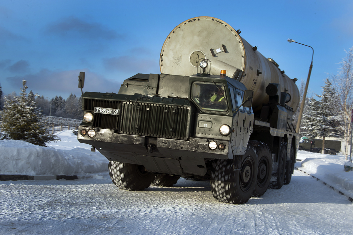 Транспортно-установочный агрегат 5Т92 комплекса противоракетной обороны А-135 «Амур» на шасси МАЗ-543М. Проведение тренировки боевыми расчётами системы ПРО 9-й дивизии противоракетной обороны.